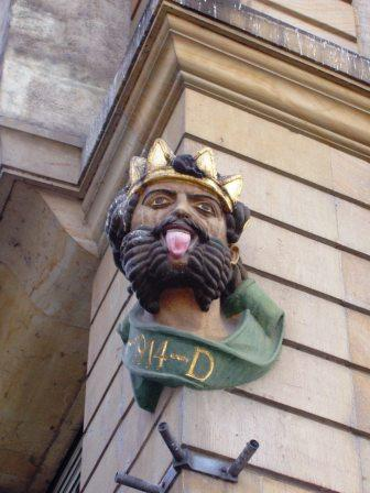 Lällenkönig am Restaurant Lällenkönig